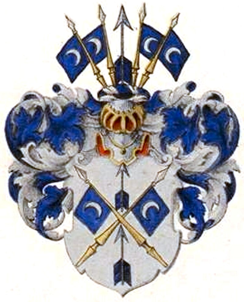 Freymanni (Nursi) suguvõsa aadlivapp